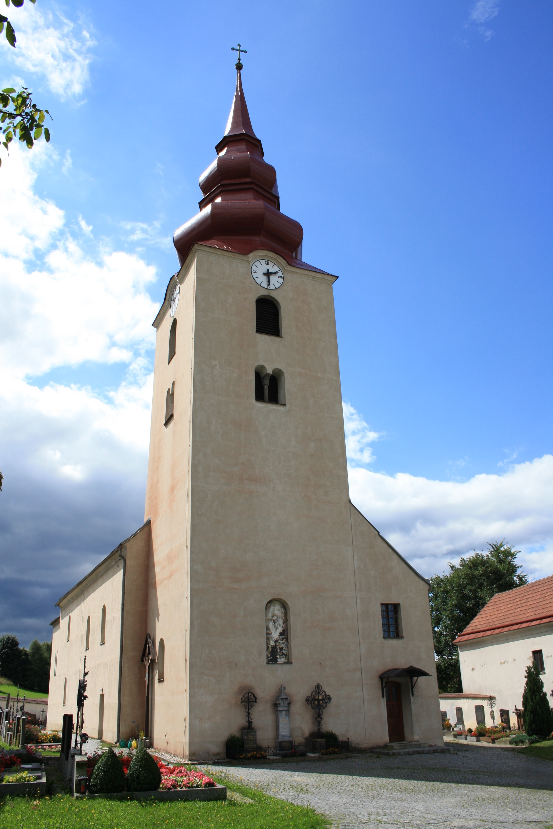 Außenansicht der Pfarrkirche Großglobnitz, Zwettl, Lower Austria